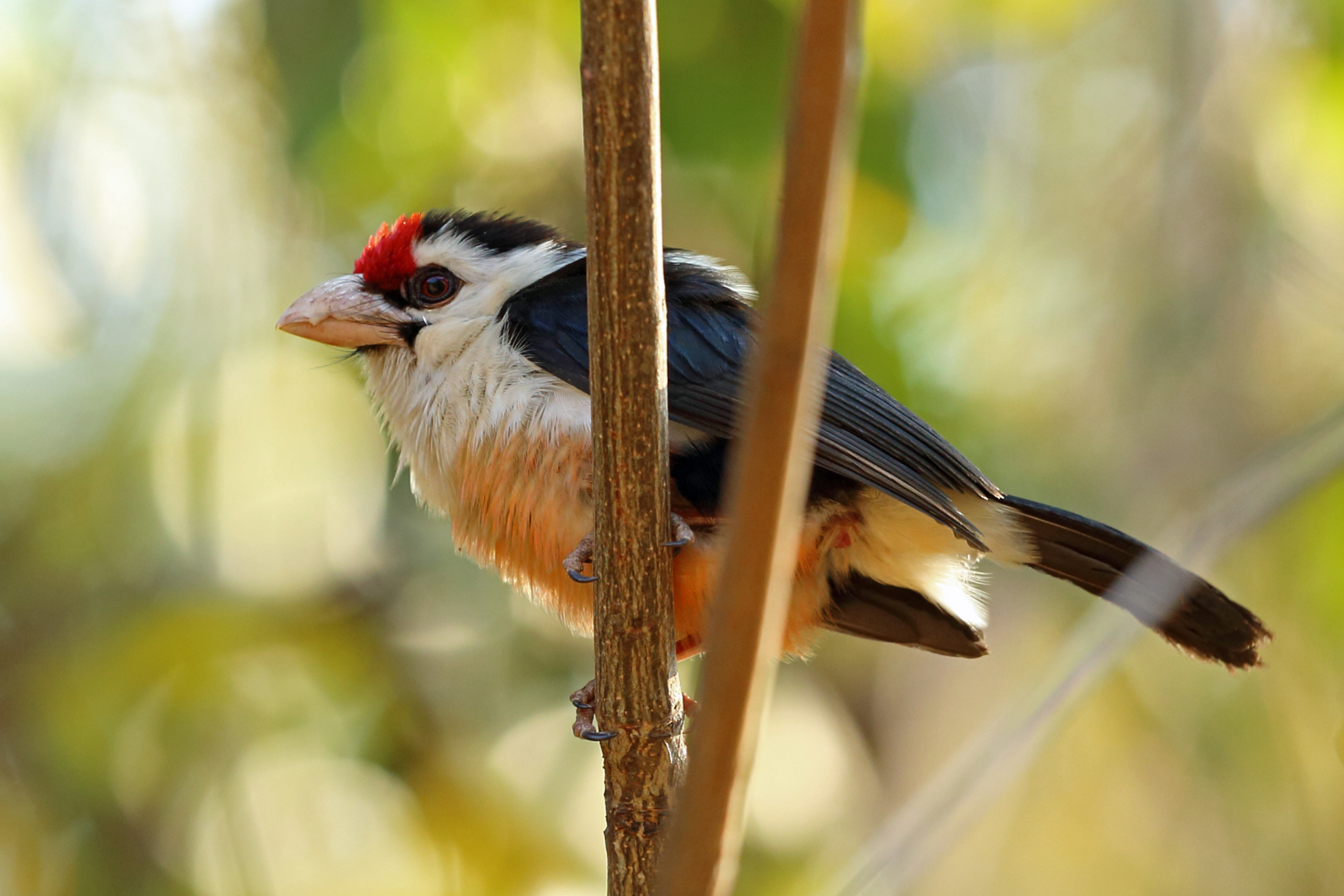 Black-backed Barbet, Sakania, DRC